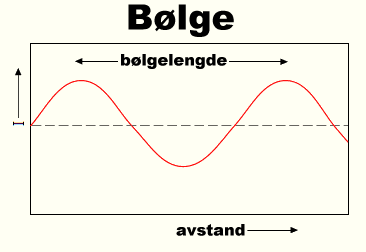 Bølgelengde Opphav: Undertegnede og et eller annet tegneprogram for en god stund siden. Basert på tilsvarende dansk bilde. --Chrmb 31. jan 2006 kl.19:39 (UTC)